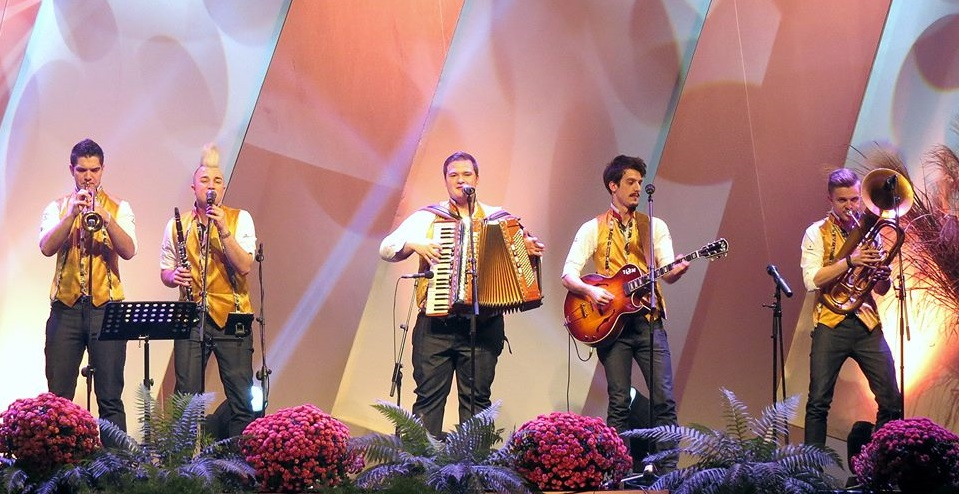 Poskočni muzikanti na koncertu Ansambla Spev v Velenju.